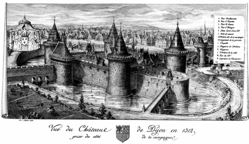 Château de Dijon en 1510, gravure d'après un dessin de Chapuis, bibliothèque municipale de Dijon